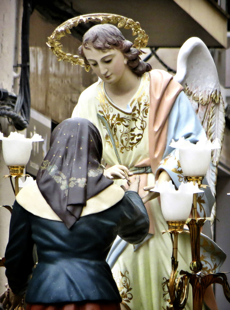 Ermita del Santo Ángel (Imagen cedida por M. Martínez)